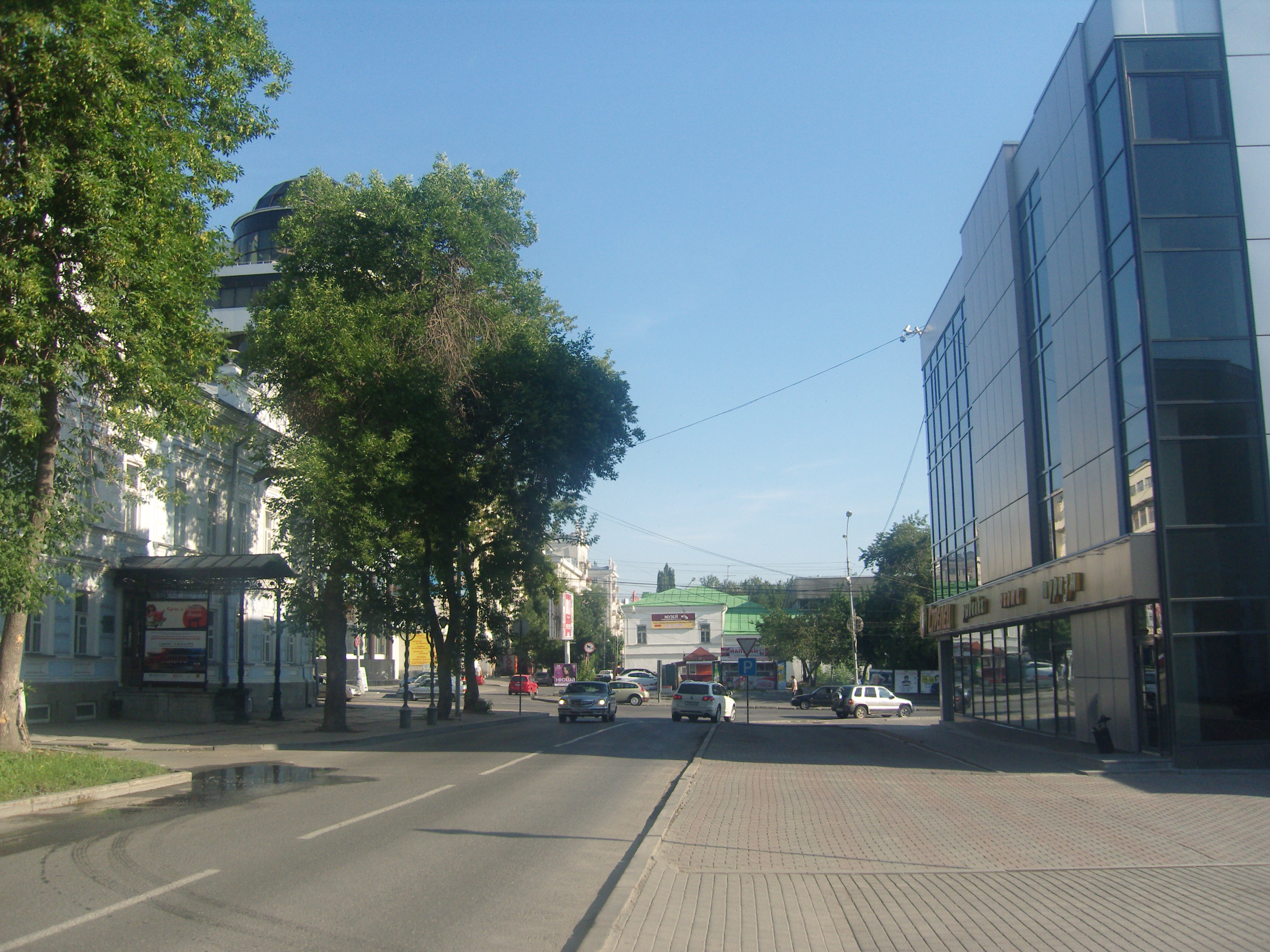 Улица Добролюбова (Екатеринбург)